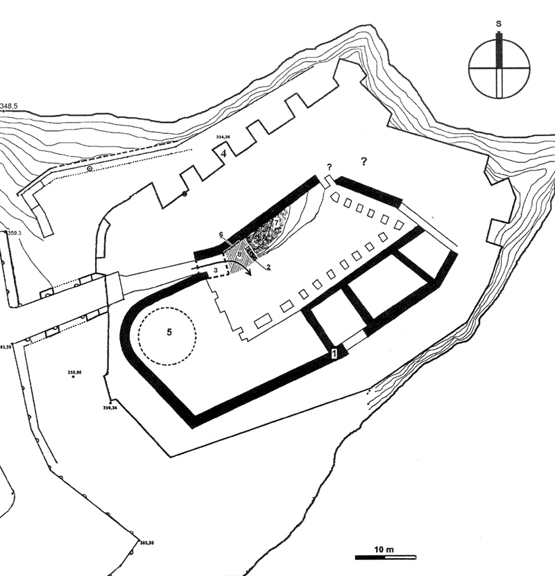 Beschreibung: Orlík nad Vltavou. Gesamtplan des Bergsporns mit Eintrag der ältesten Bauphase der Burg (schwarz). *Quelle: Grabolle/ Hrubý/ Militký 2002, 113 Abb. 16.; *Lizenzstatus: GNU FDL. Kategorie:Bild:Burg